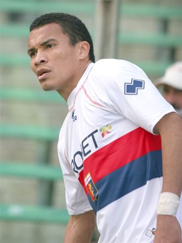 Genoa CFC player, Julio César de Léon Dailey